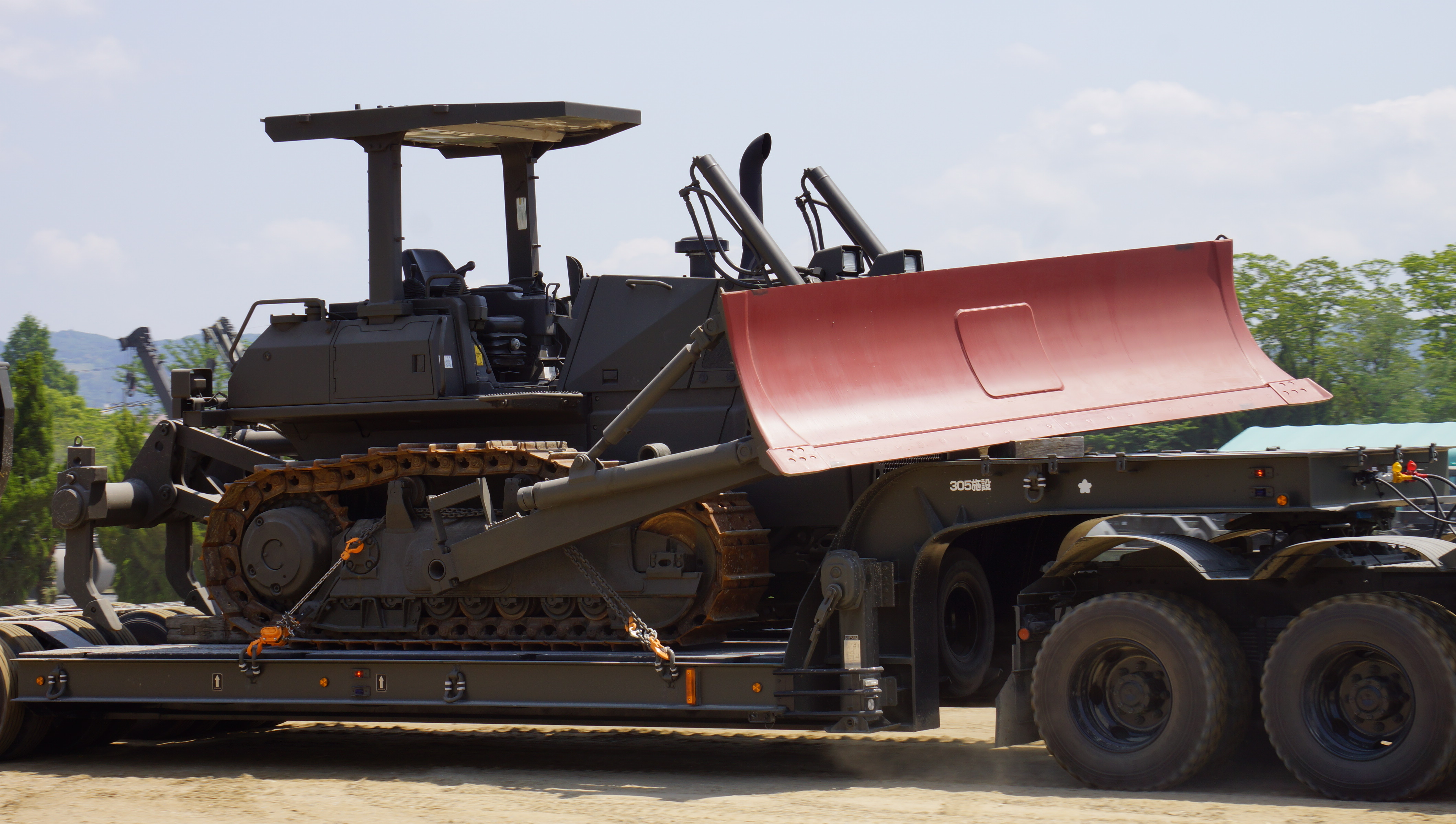 陸上自衛隊 中型ドーザ。 13年5月26日 陸上自衛隊大久保駐屯地にて。